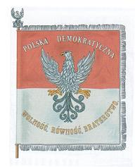 Sztandar TDP